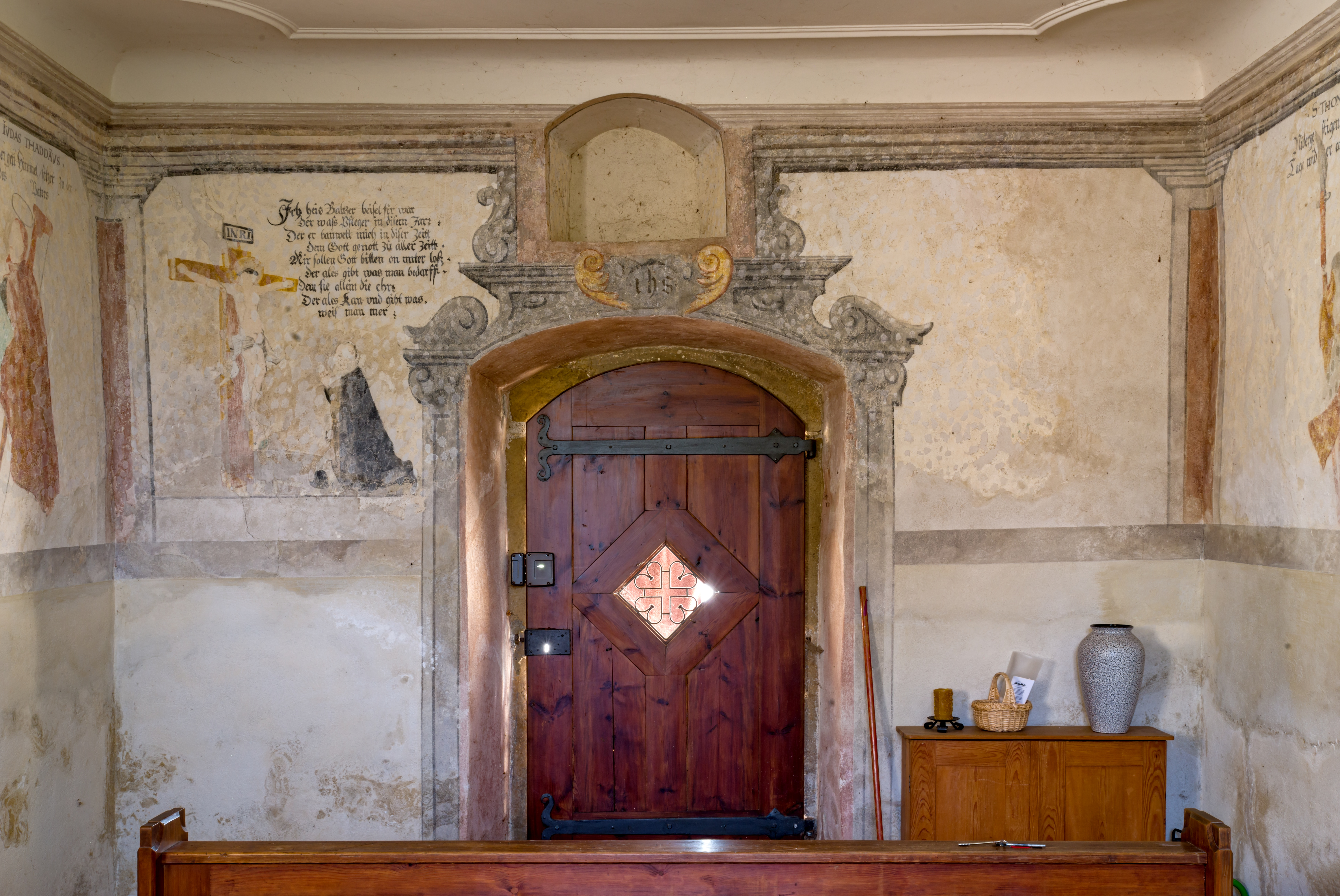 Bilder aus Staufen im Breisgau, die St. Magdalenenkapelle